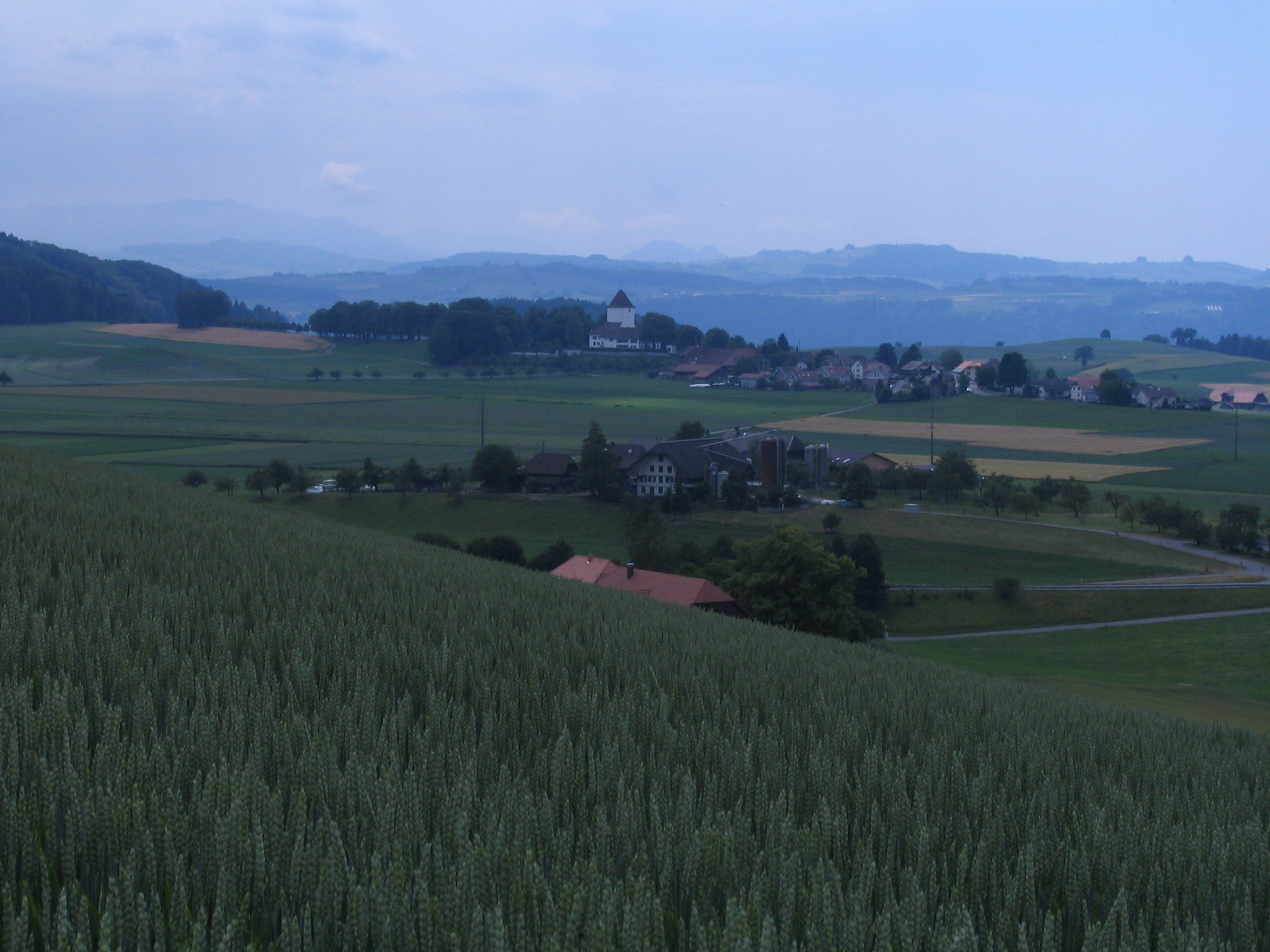 Schloss Wil in Schlosswil (Kanton Bern, Schweiz) und Umgebung